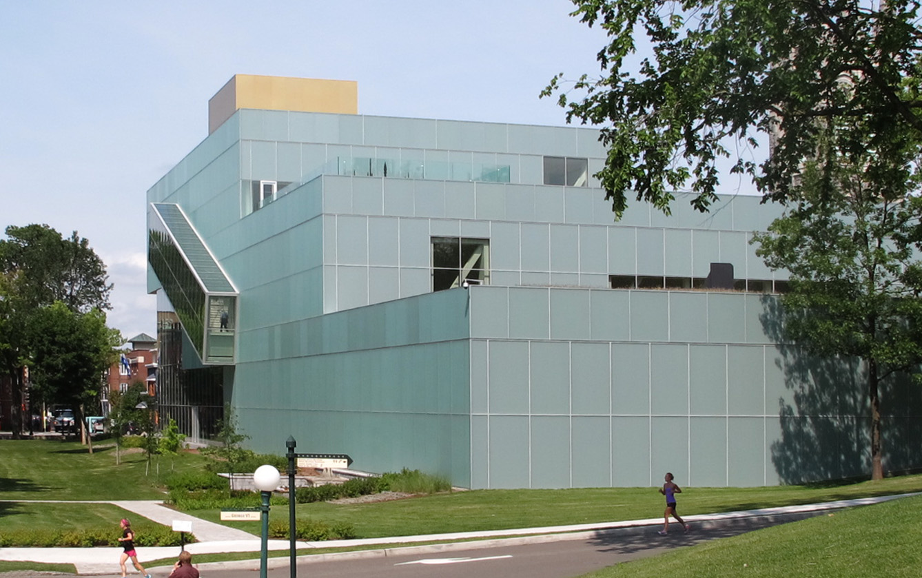 Musée national des beaux-arts du Québec. Le pavillon Pierre-Lassonde vu du pavillon central.